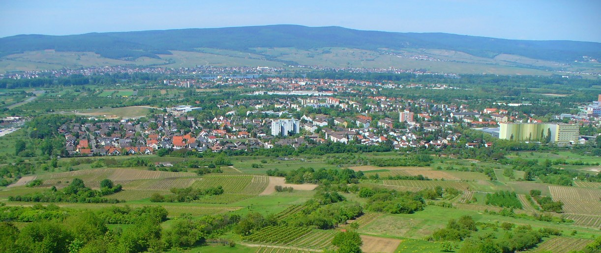 Ingelheim West vom Bismarckturm